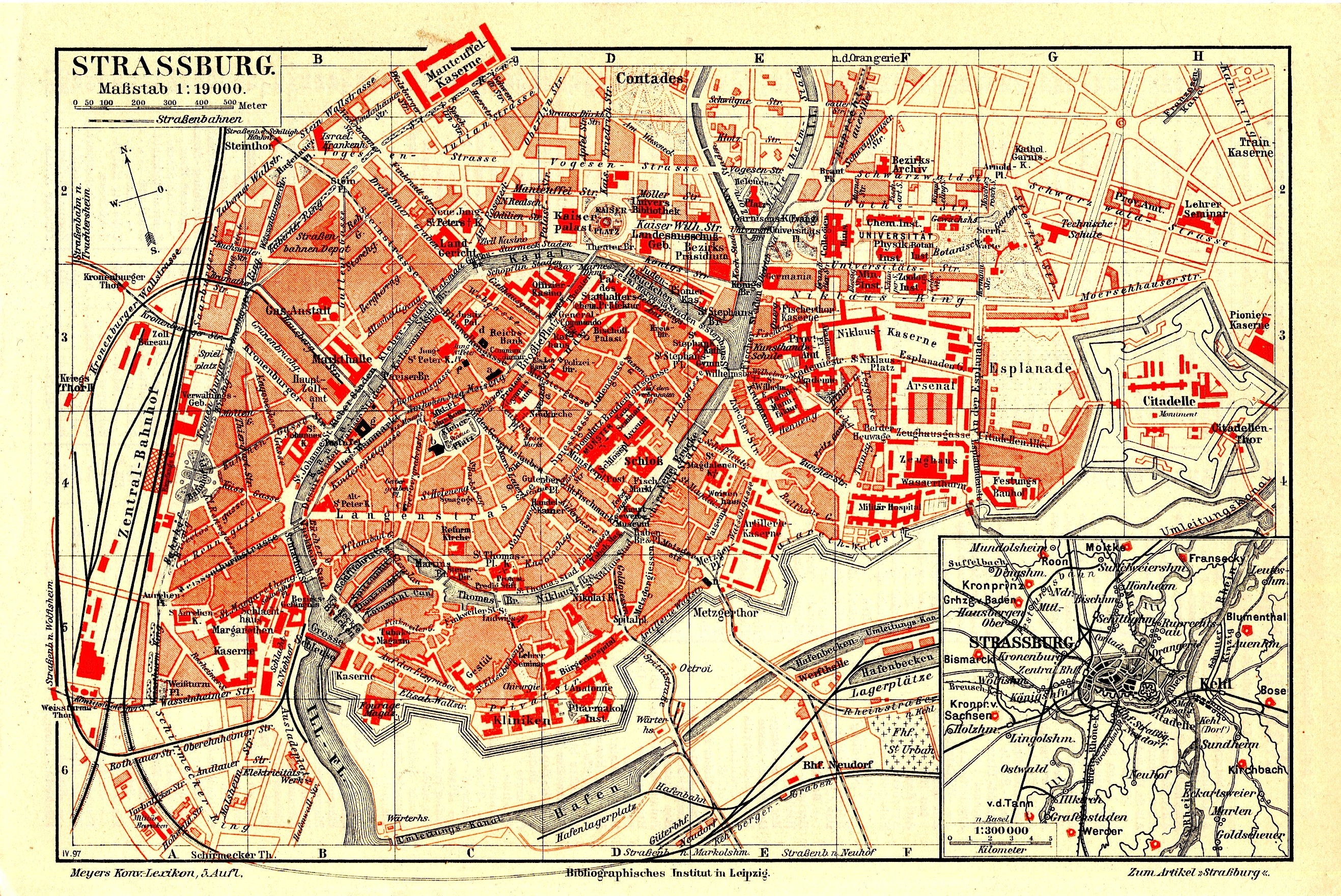 Carte de Strasbourg, Meyers Konversationslexikon, 5. Auflage. 1888.